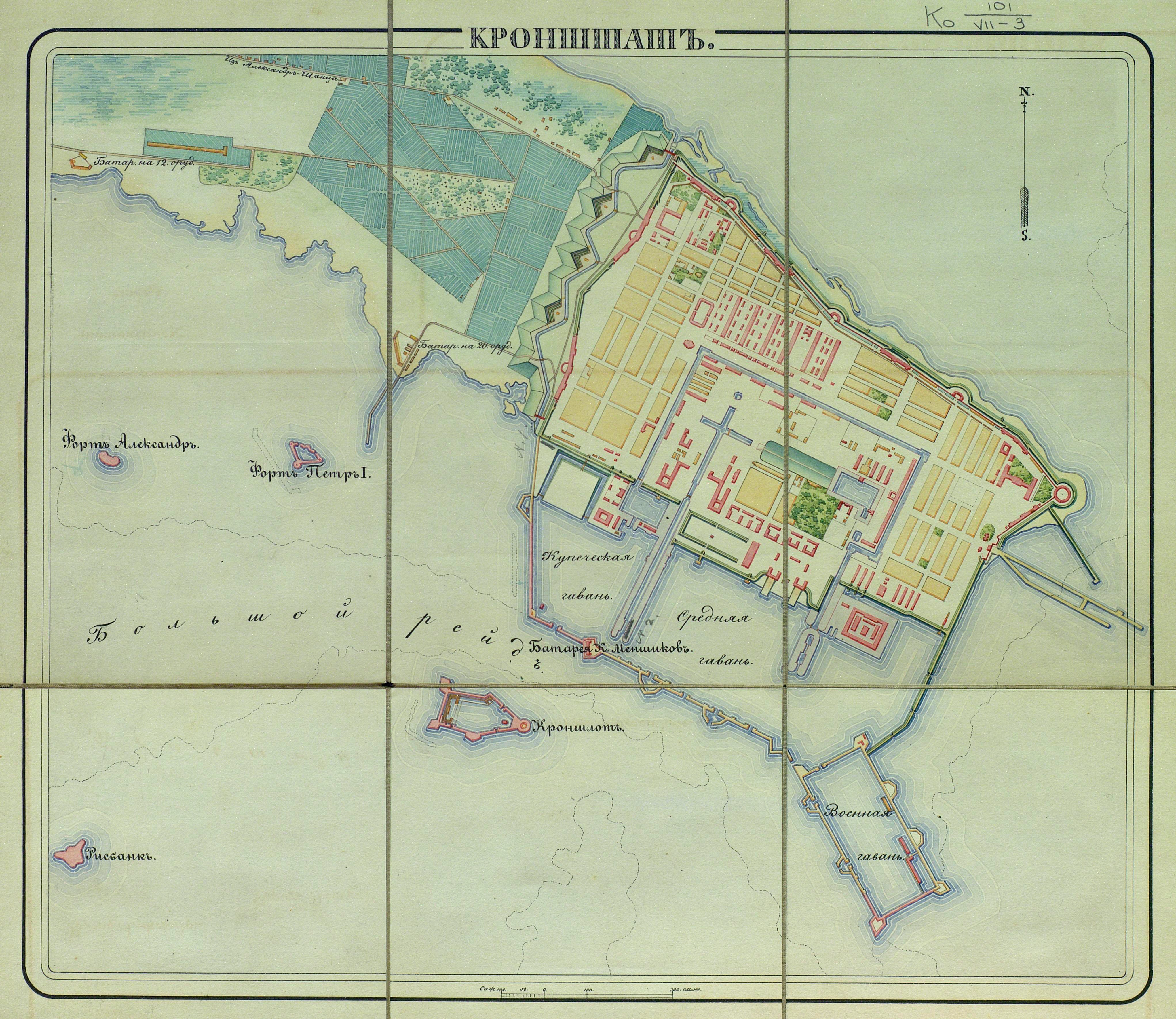 План крепости Кронштадт из "Атласа крепостей Российской империи".